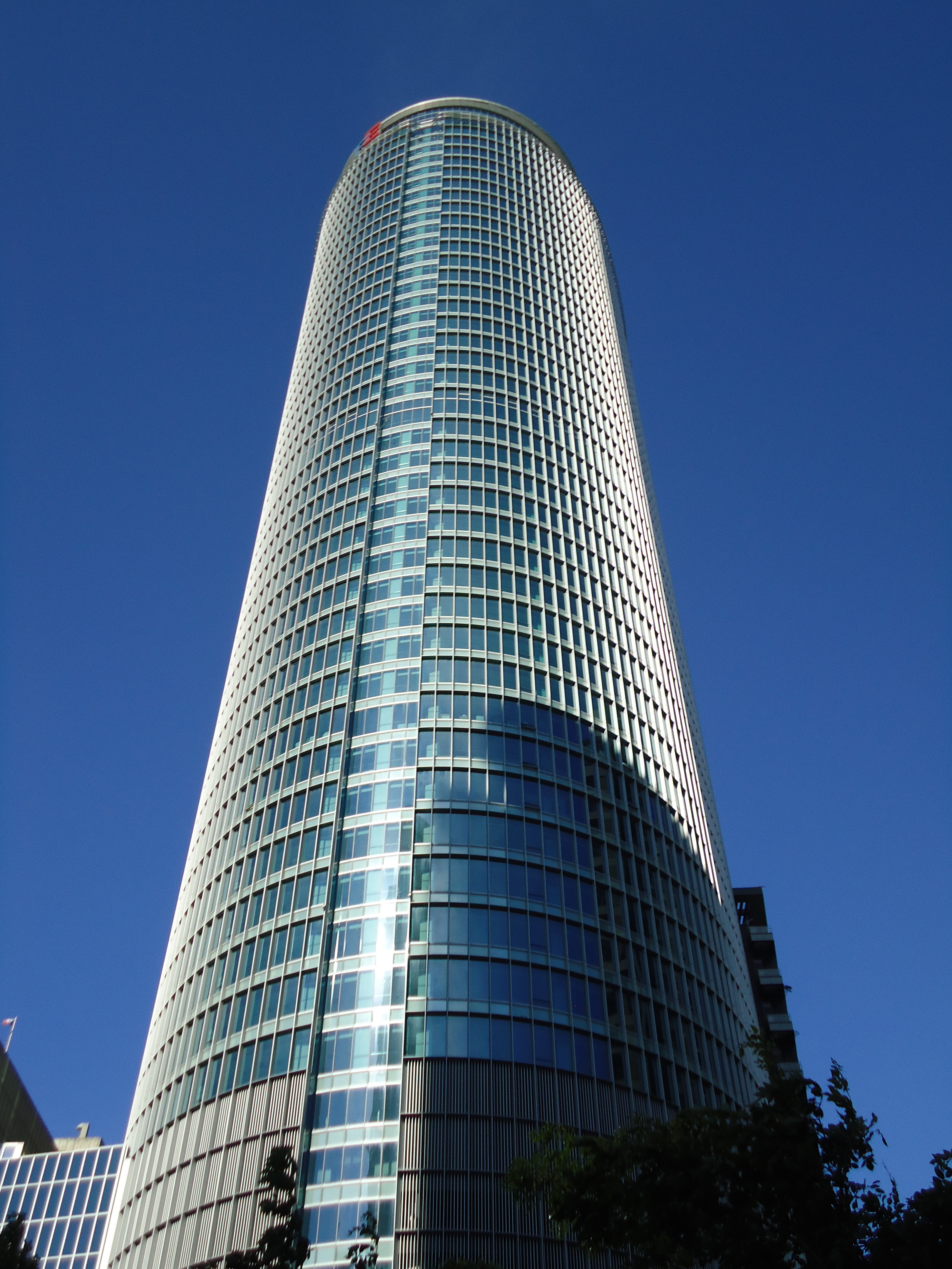 板橋大遠百二期辦公大樓，位於台灣新北市板橋區。為新北市第一高大樓。